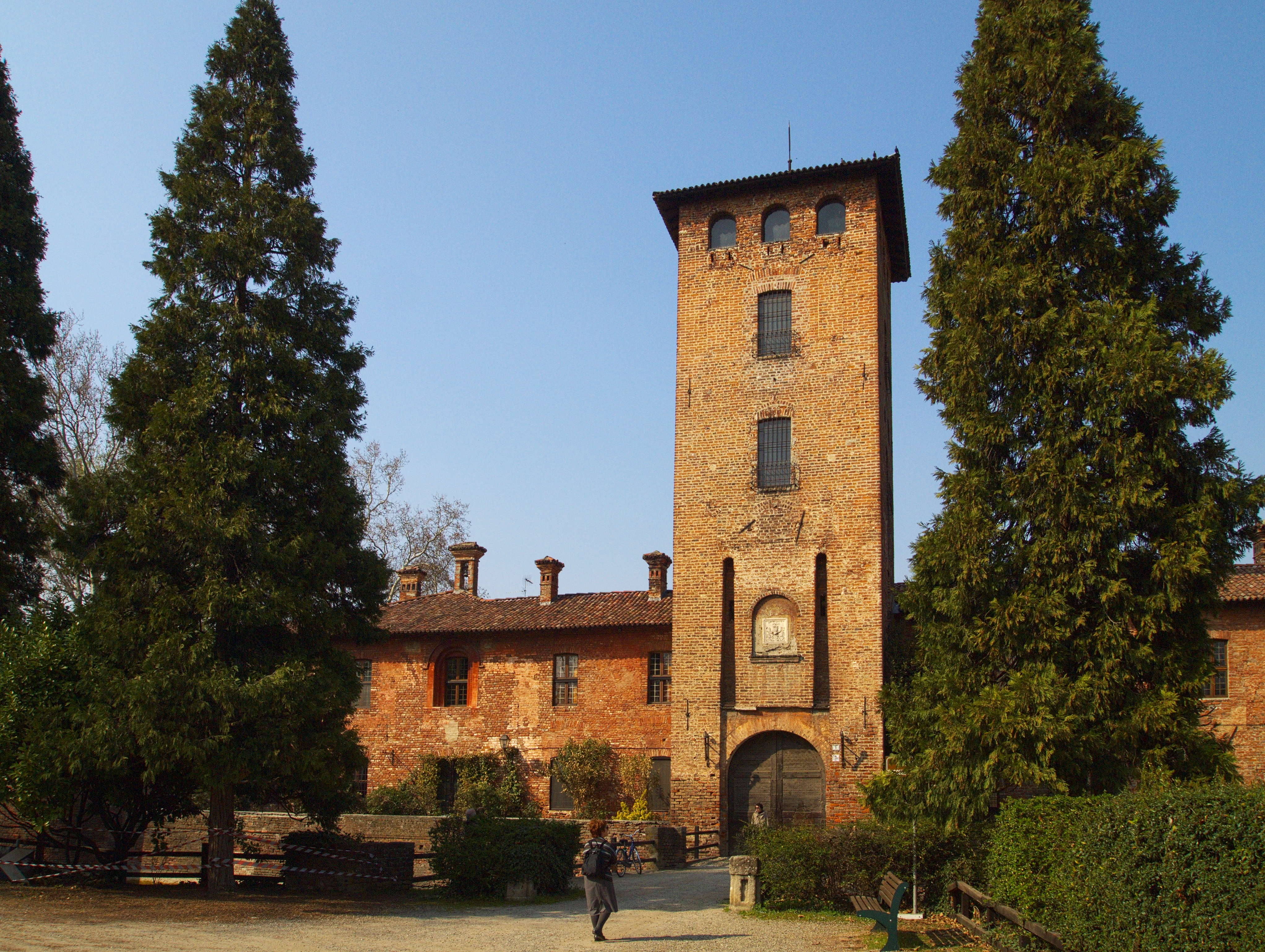 Castello Peschiera Borromeo